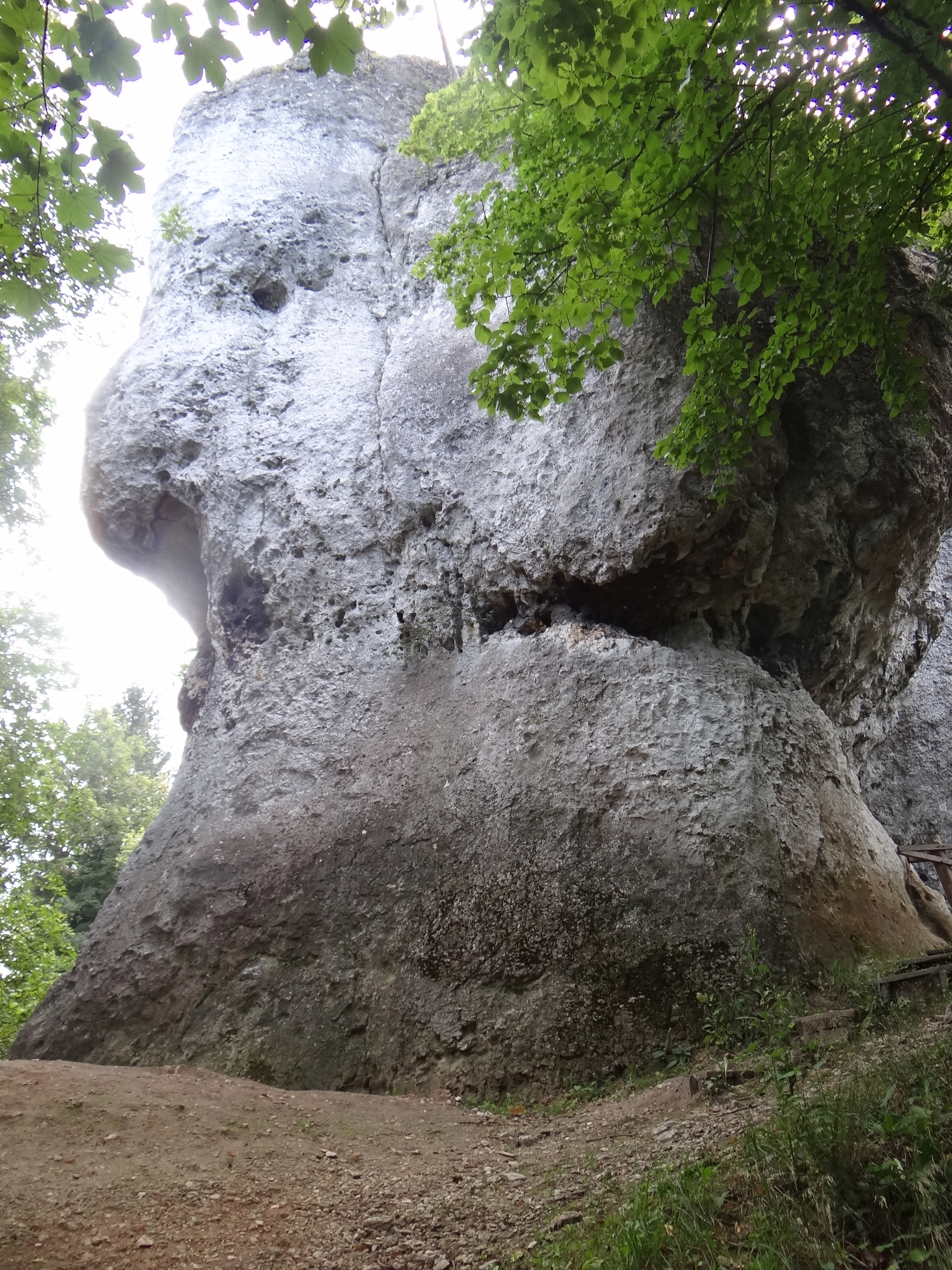 Skała Biśnik w Dolinie Wodącej